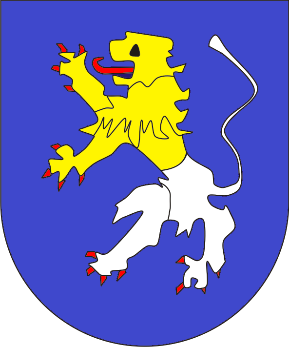 coats of arms of the county of Pleissen